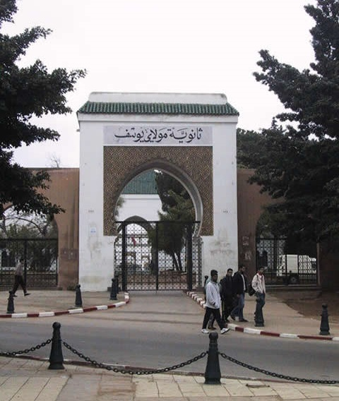 مدخل باب ثانوية مولاي يوسف في مدينة الرباط - المغرب